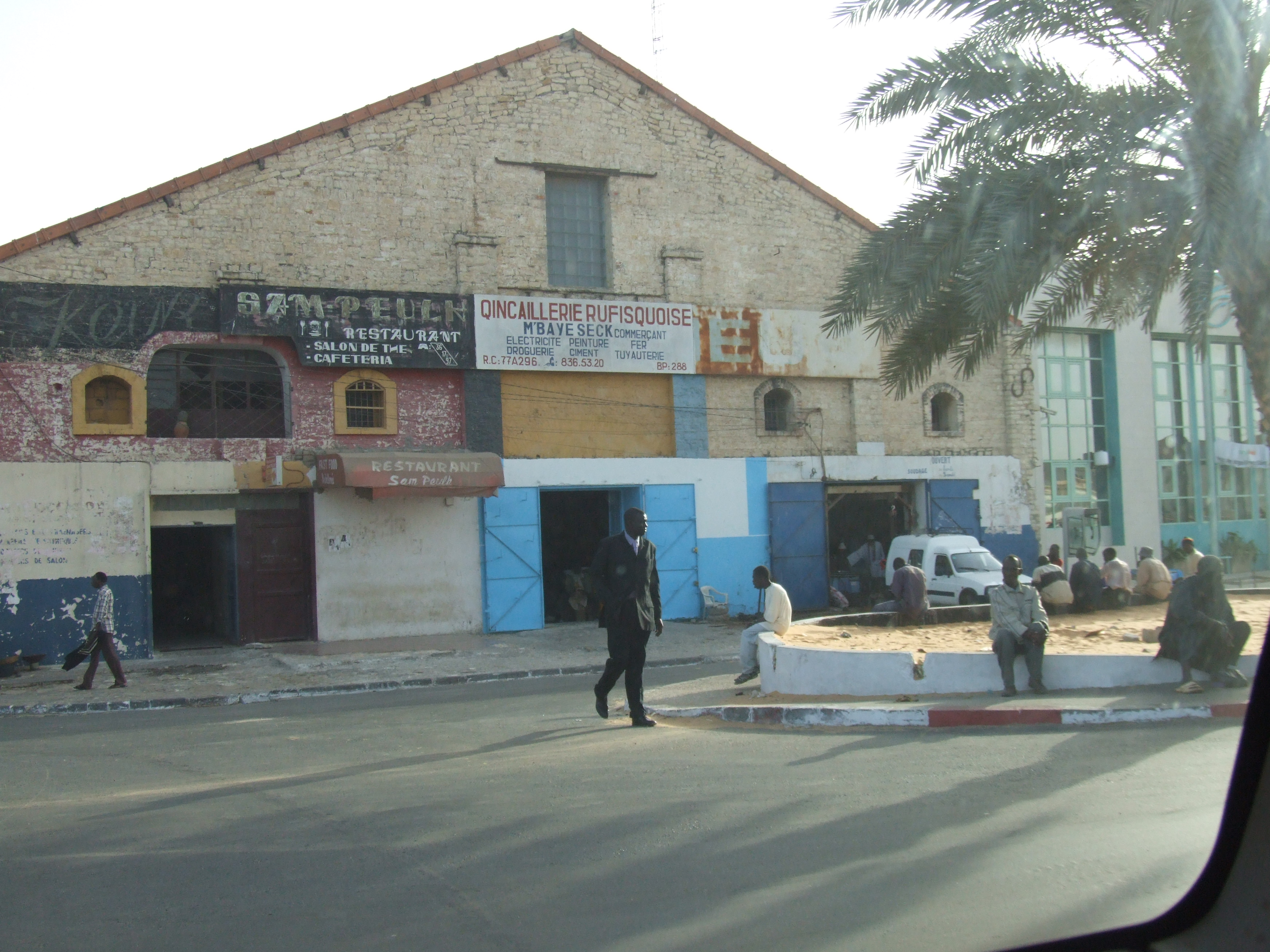 Une quincaillerie à Rufisque (Sénégal)